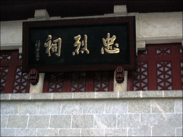 蒋中正题额